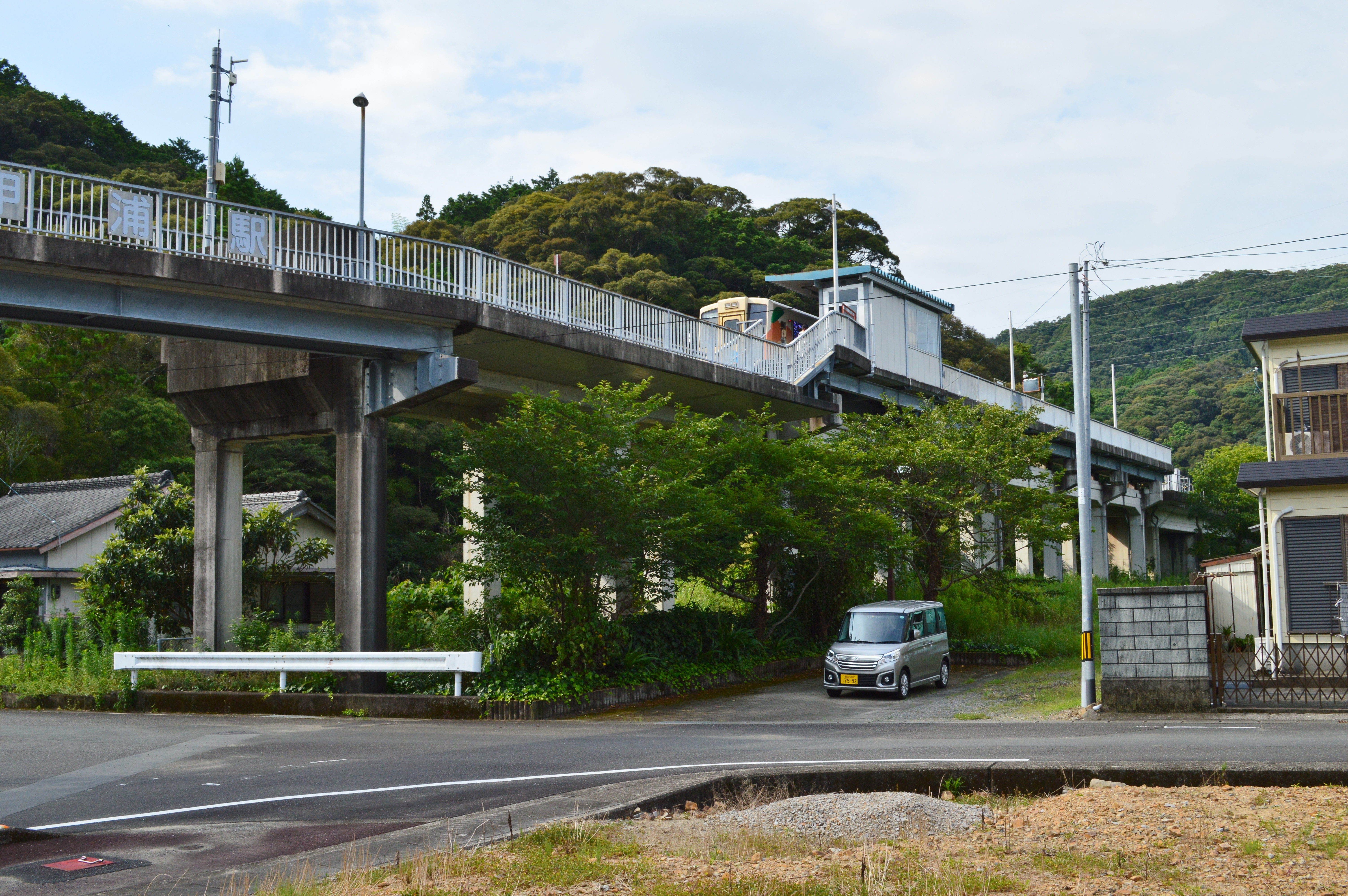 甲浦駅 線路末端部